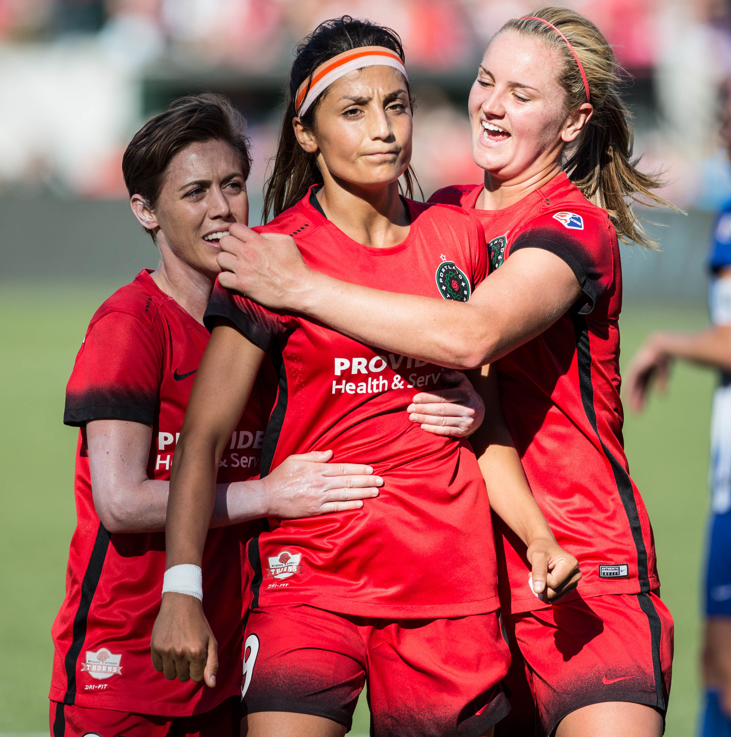 N42A2905.jpg